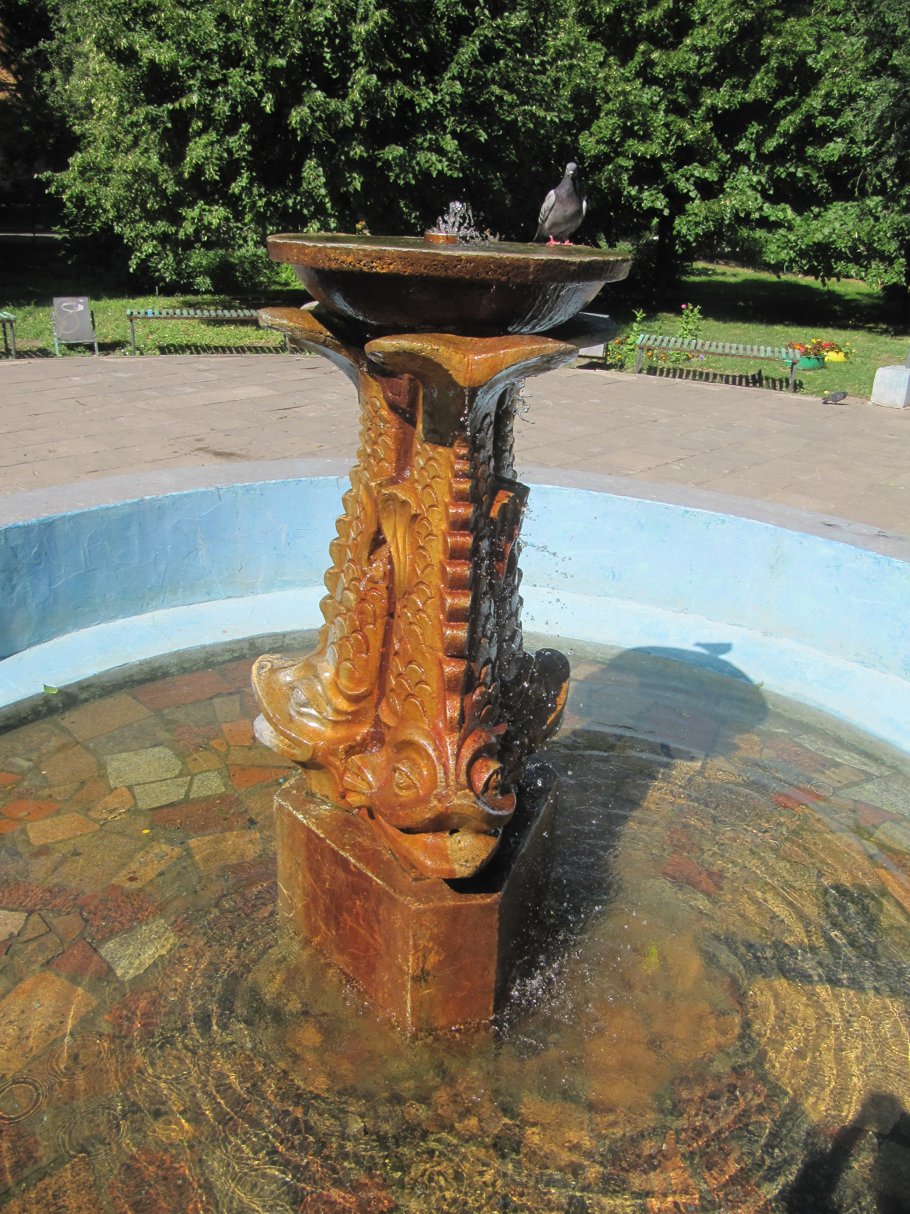 Фонтан Три рыбы, ул. Московская (угол ул. Соляная), Саратов. В фонтане — три рыбы, также как на гербе Саратова.